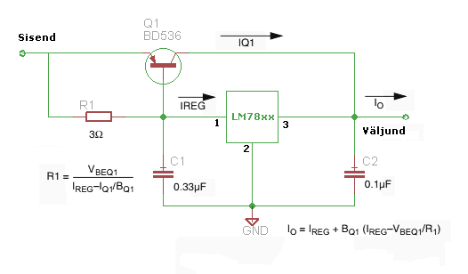 Võimsustransistoriga skeem